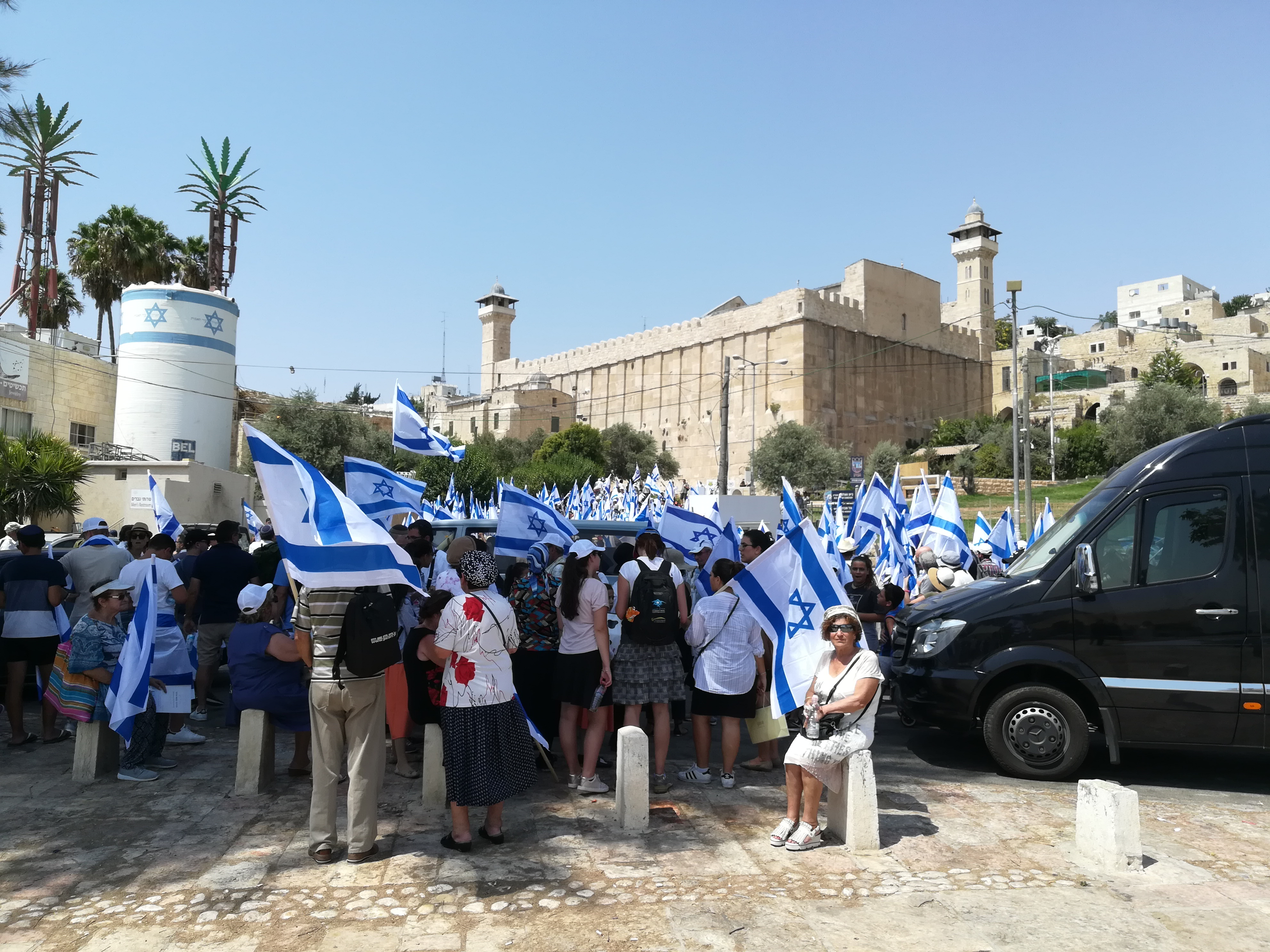 Manifestation d'un millier de francophones à Hébron contre la décision de l'Unesco de juillet 2017.